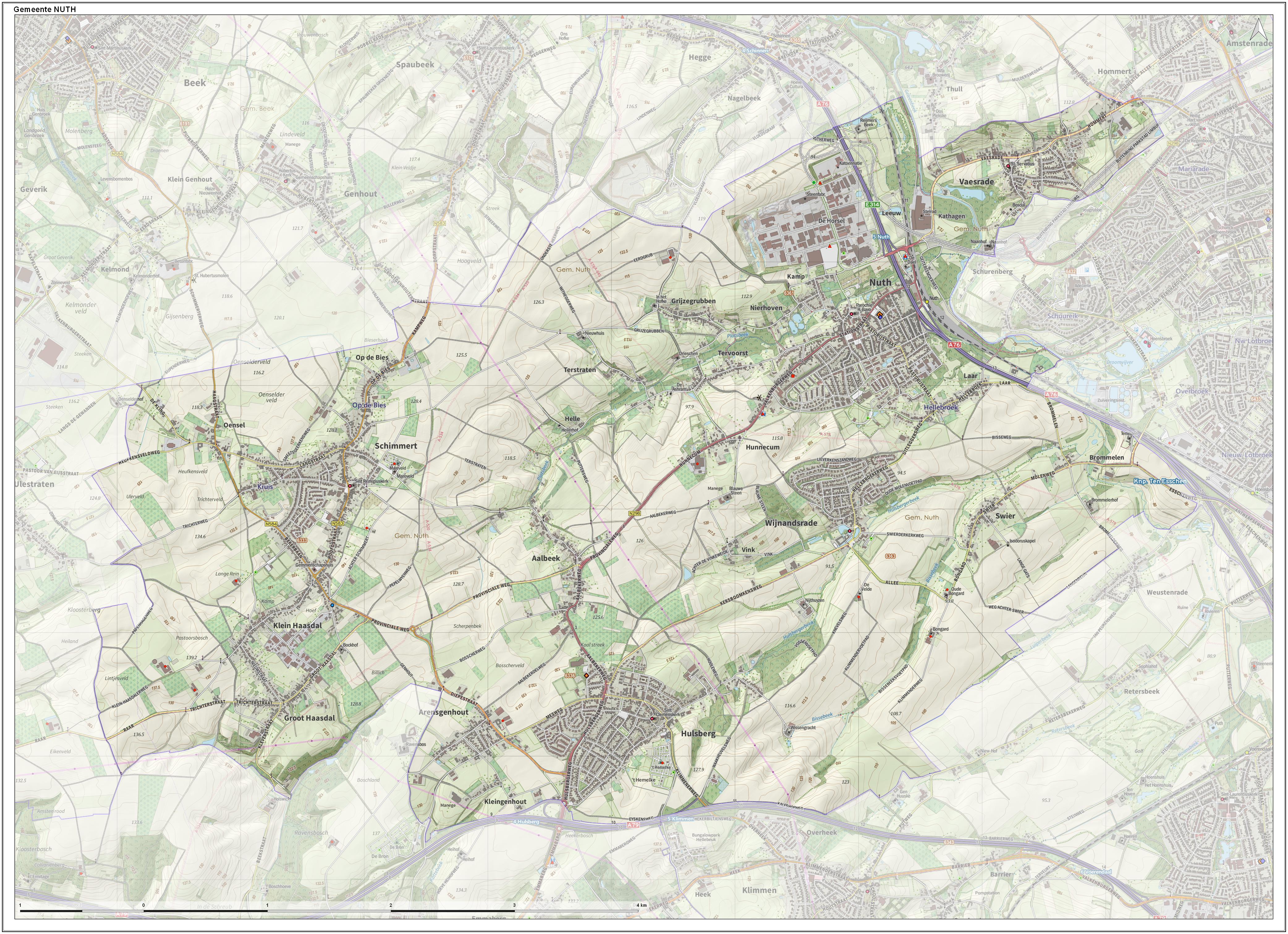 Topografische gemeentekaart. Resolutie: 400 pixels/km. Kaartbeeld samengesteld uit de open geodata van de Top10NL en Top25namen (Kadaster), Creative Commons-BY licentie. Gebouwvlakken uit open geodata BAG extract. Wegen uit de OpenStreetMap, OpenStreetMap community. Reliëfschaduw uit de Actuele Hoogtekaart AHN2. Samenstelling en kleurenschema: Jan-Willem van Aalst, met QGIS. Zie ook de Legenda.